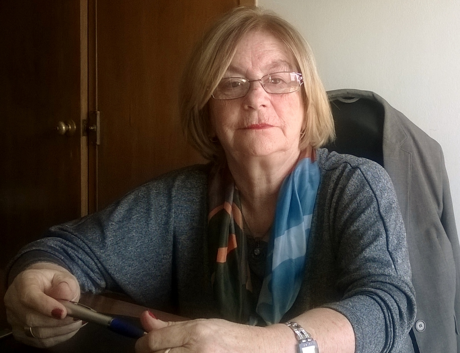 Mirtha Guianze